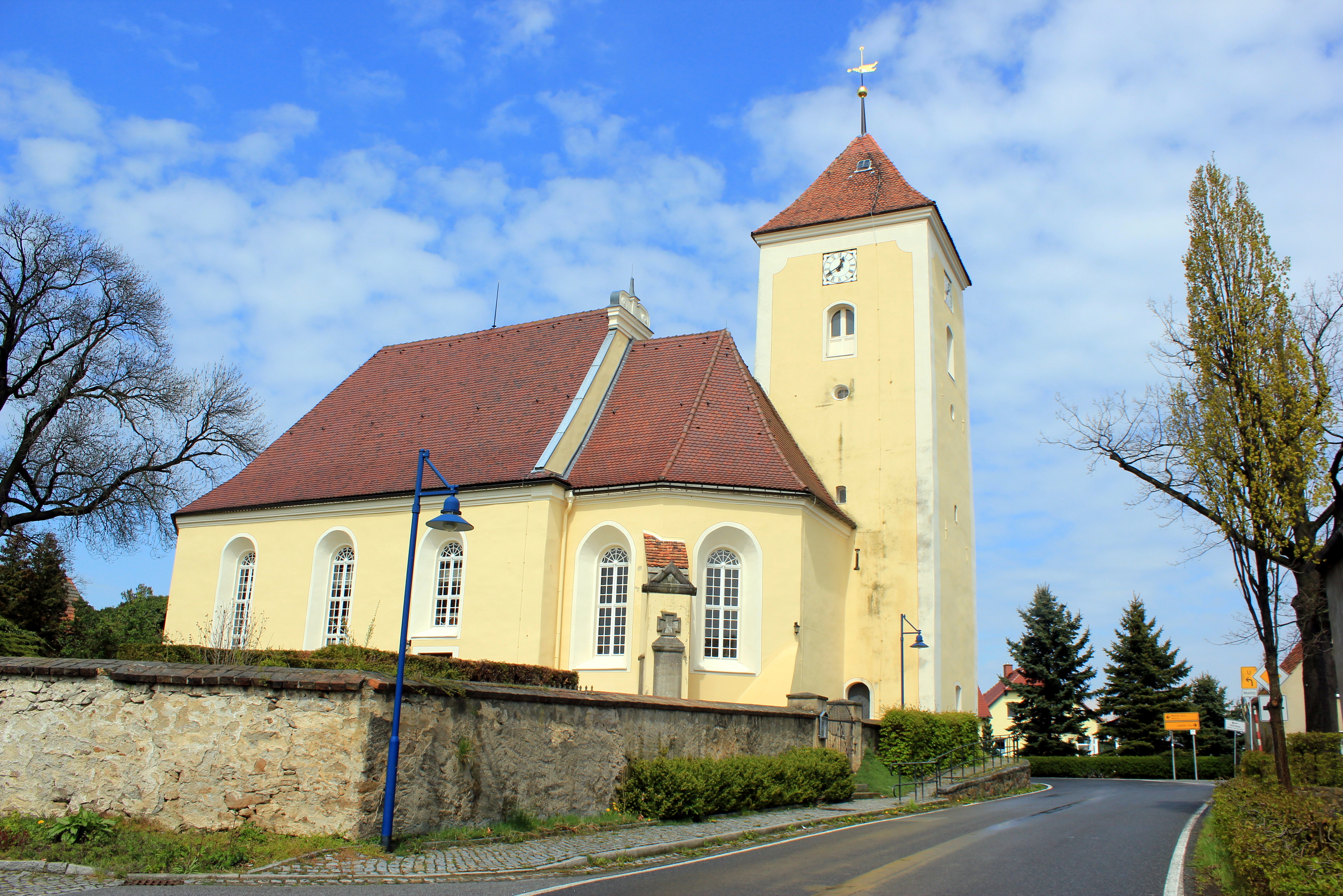 Hornjoserbsce: Ewangelska cyrkej w Nosaćicach.